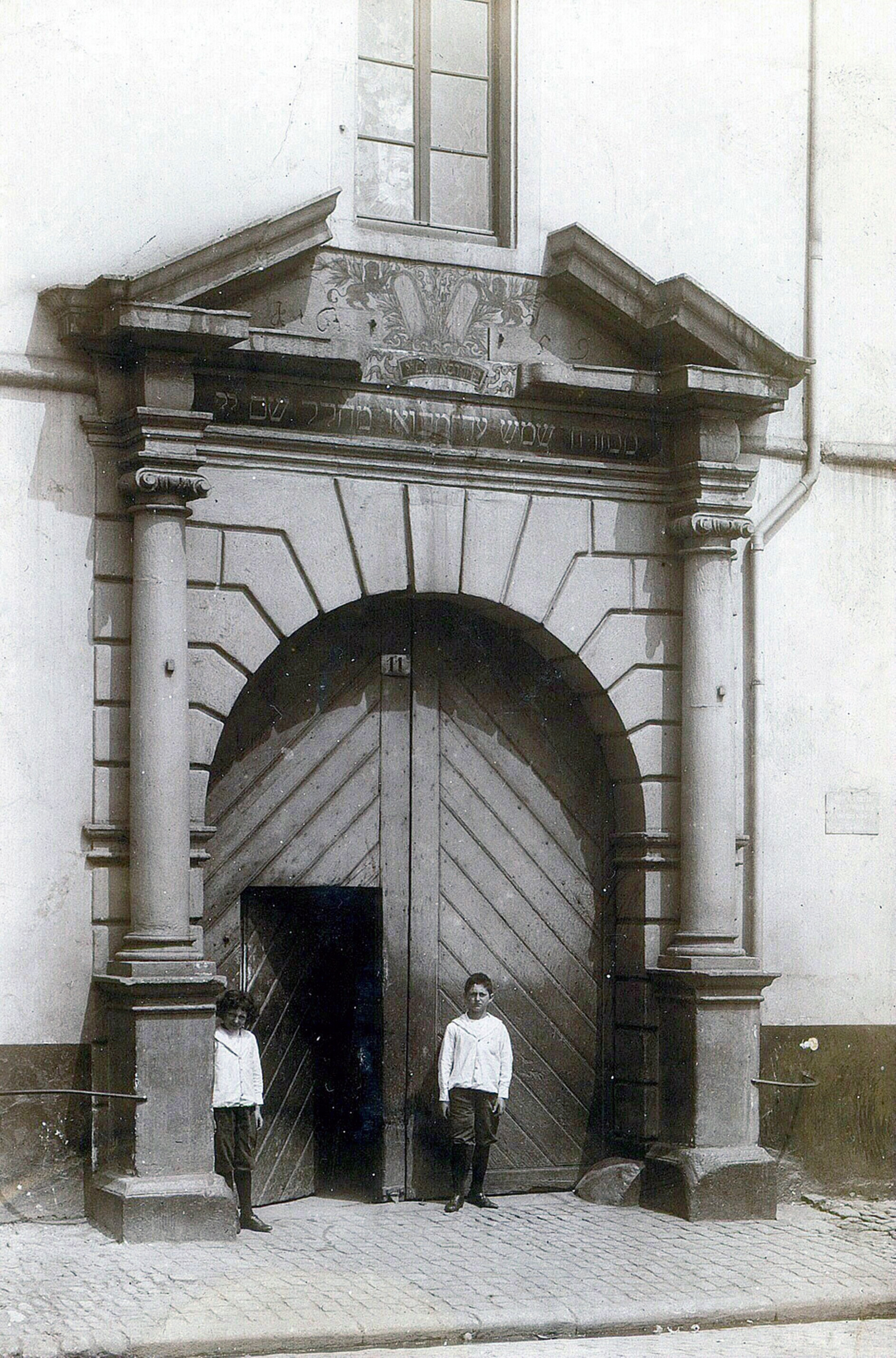 Stiehl Otto (1860-1940), Skizzen- und Fotoalbum 11: Portal am St. Florinsplatz: Ansichten. Foto auf Papier,.